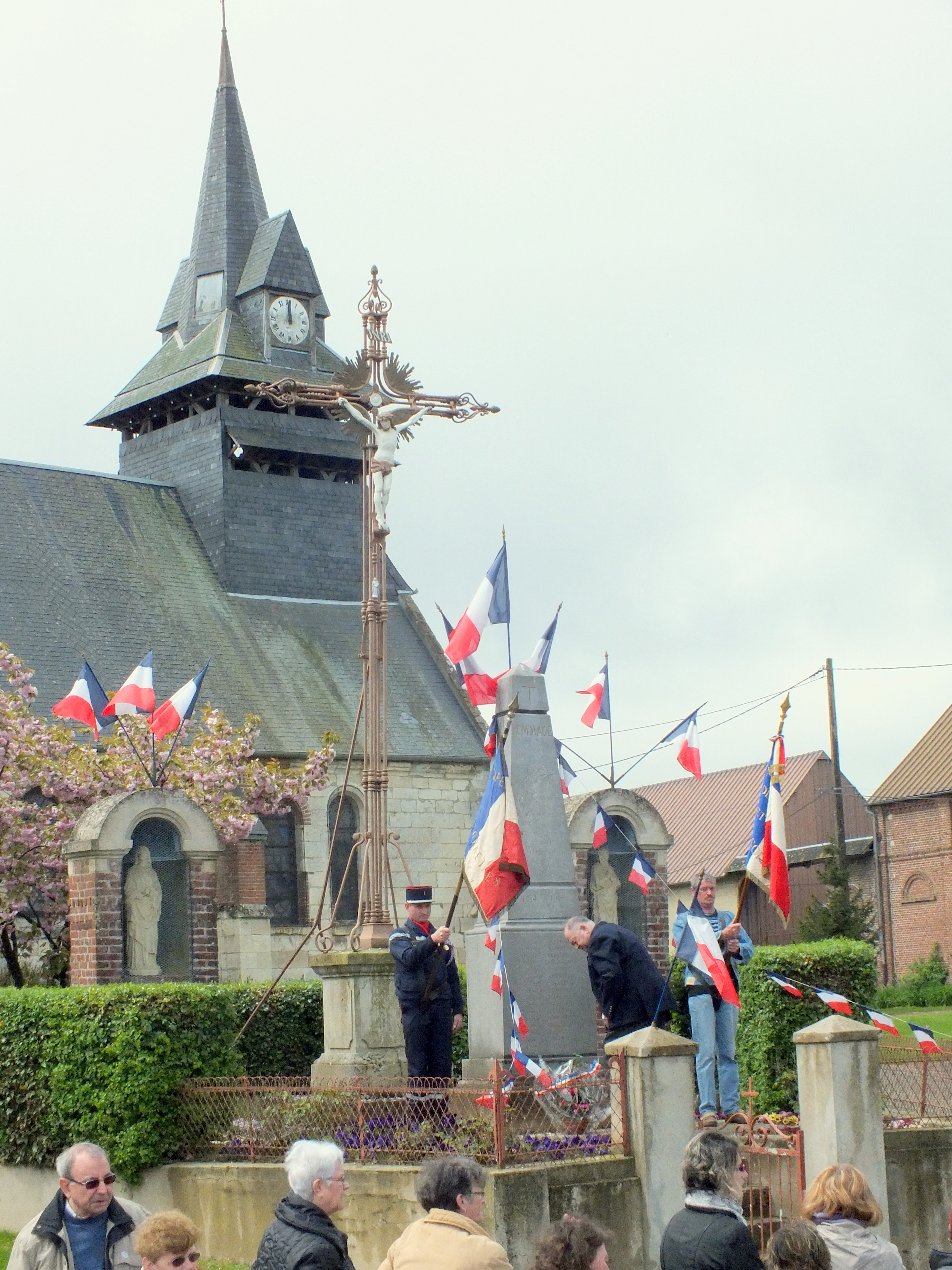 Cérémonie du 8 mai.